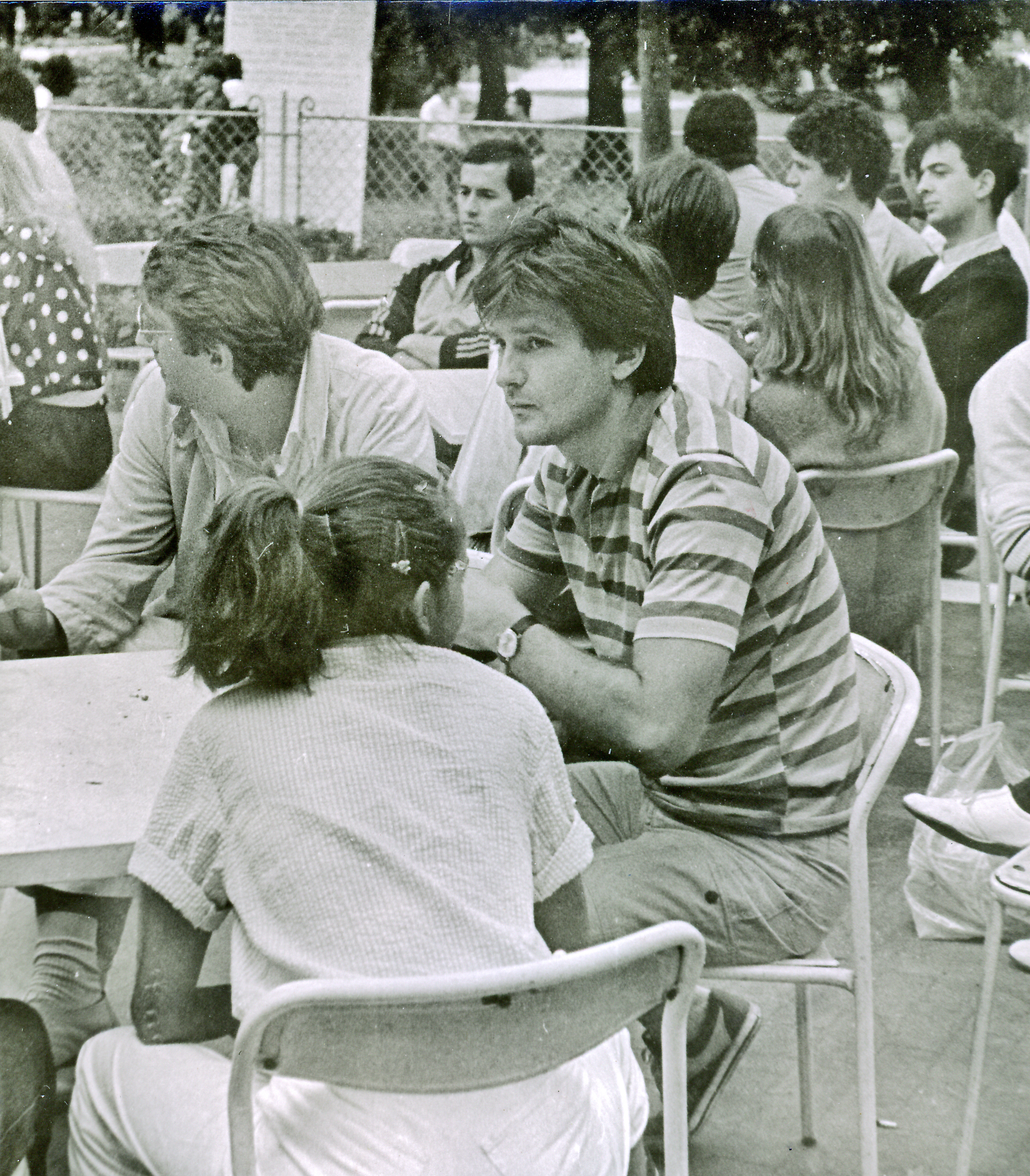 Milan Štrljić na Filmskim susretima u Nišu 1984. godine